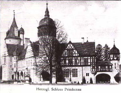 Primkenauer Schloss, 1894 bis1897 erbaut, Ansichtskarte